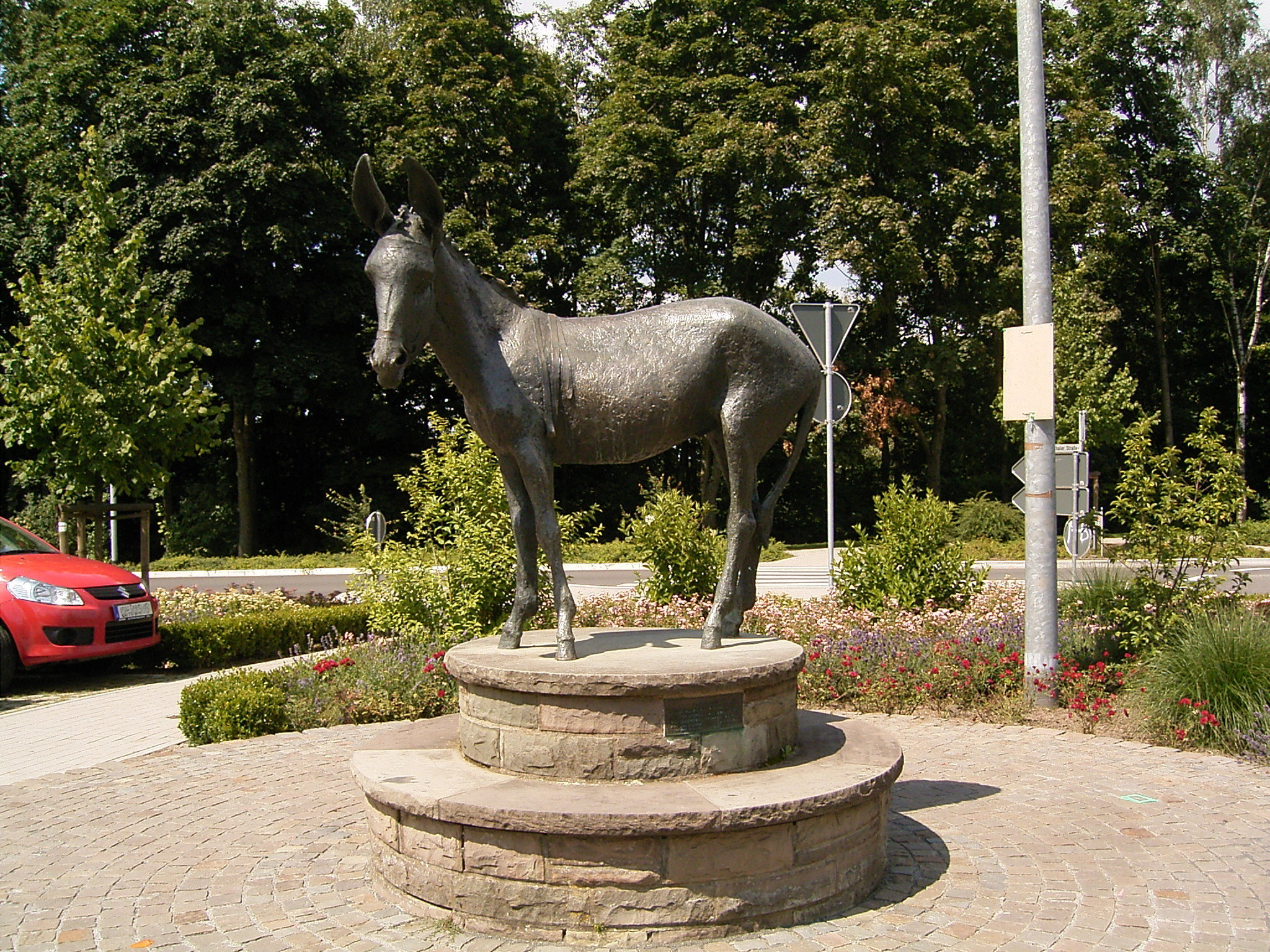 Kürten-Bechen